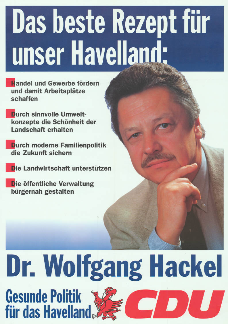 Das beste Rezept für unser Havelland: . Handel und Gewerbe fördern und damit Arbeitsplätze schaffen . Durch sinnvolle Umweltkonzepte die Schönheit der Landschaft erhalten . Durch moderne Familienpolitik die Zukunft sichern . Die Landwirtschaft unterstützen . Die öffentliche Verwaltung bürgernah gestalten Dr. Wolfgang Hackel Gesunde Politik für das Havelland CDU Abbildung: Porträtfoto Plakatart: Kandidaten-/Personenplakat mit Porträt Objekt-Signatur: 10-033 : 218 Bestand: Landtagswahlplakate Brandenburg (10-033) GliederungBestand10-18: Landtagswahlplakate Brandenburg (10-033) » CDU Lizenz: KAS/ACDP 10-033 : 218 CC-BY-SA 3.0 DE